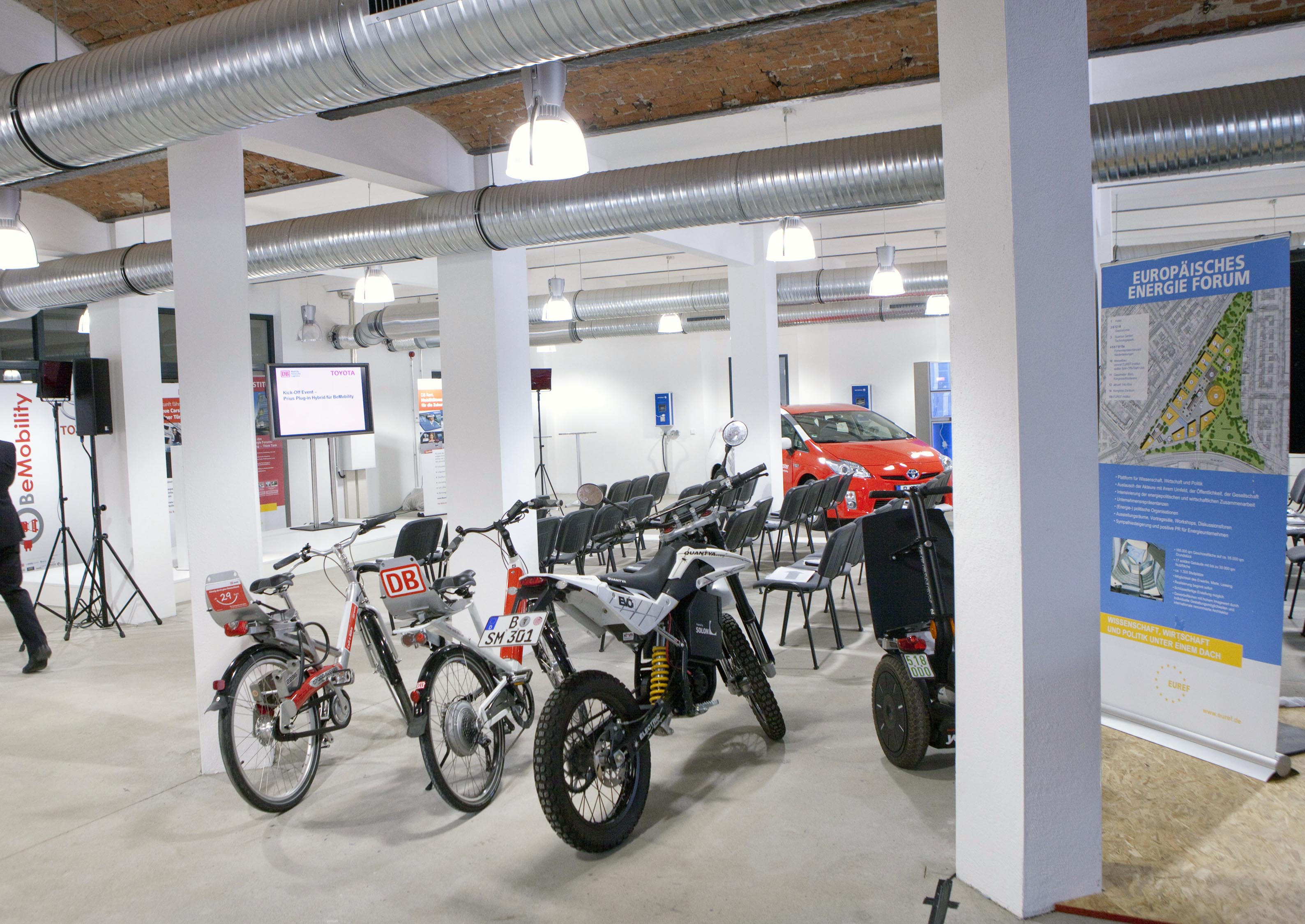 Die Plattform Elektromobilität am Gasometer Schöneberg: Zentraler Standort des Projektes BeMobility